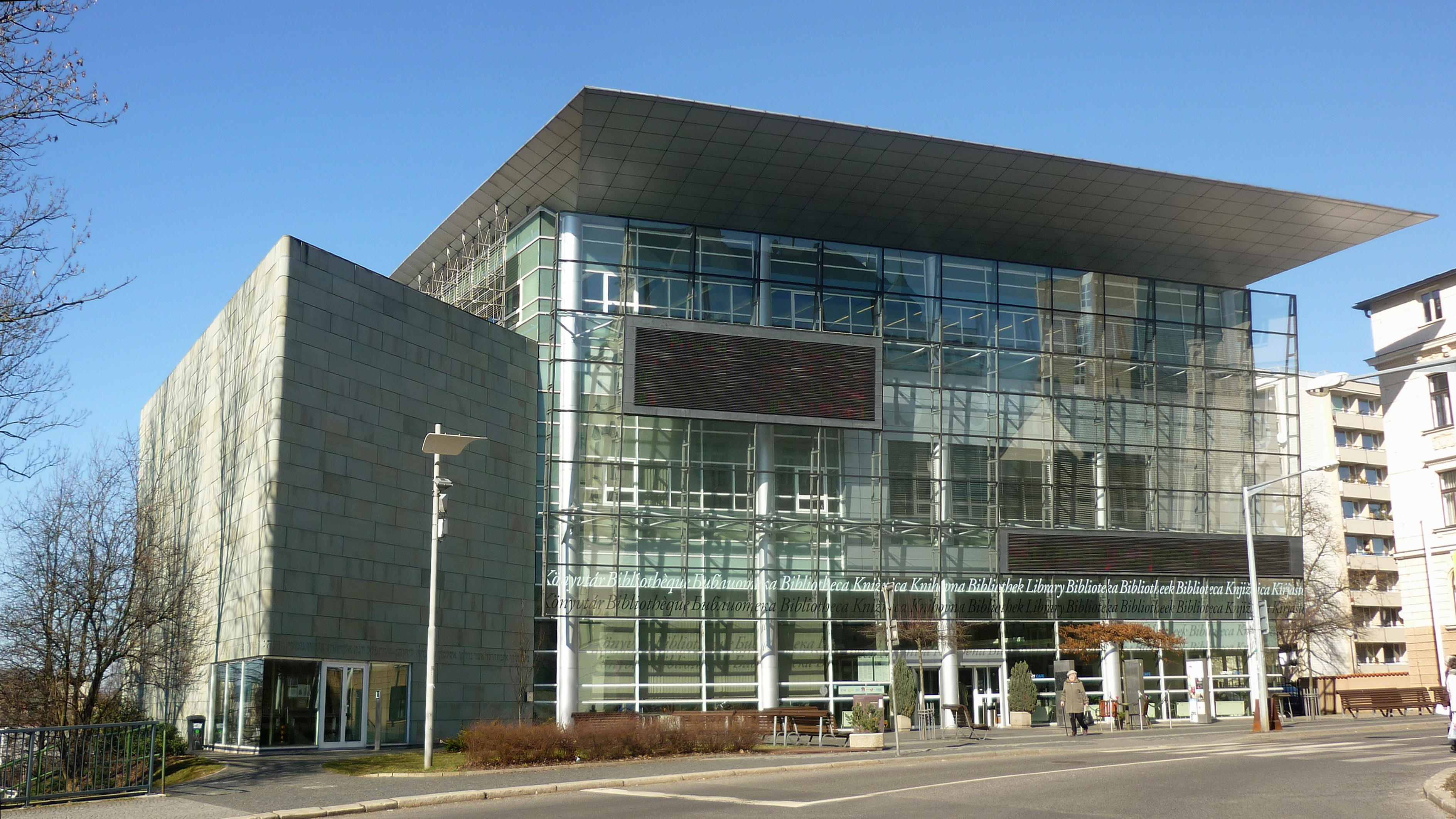 Liberec (Reichenberg) – Regional-Bibliothek und neue Synagoge